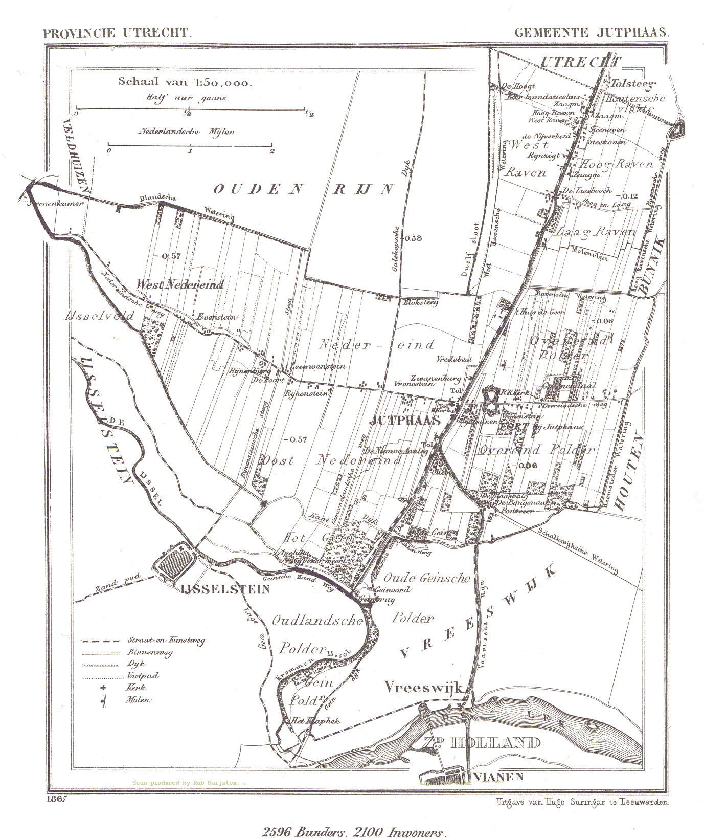 Kaart van Jutphaas uit Gemeente Atlas van Nederland, J. Kuyper 1865-1870, Uitgave Hugo Suringar Leeuwarden.